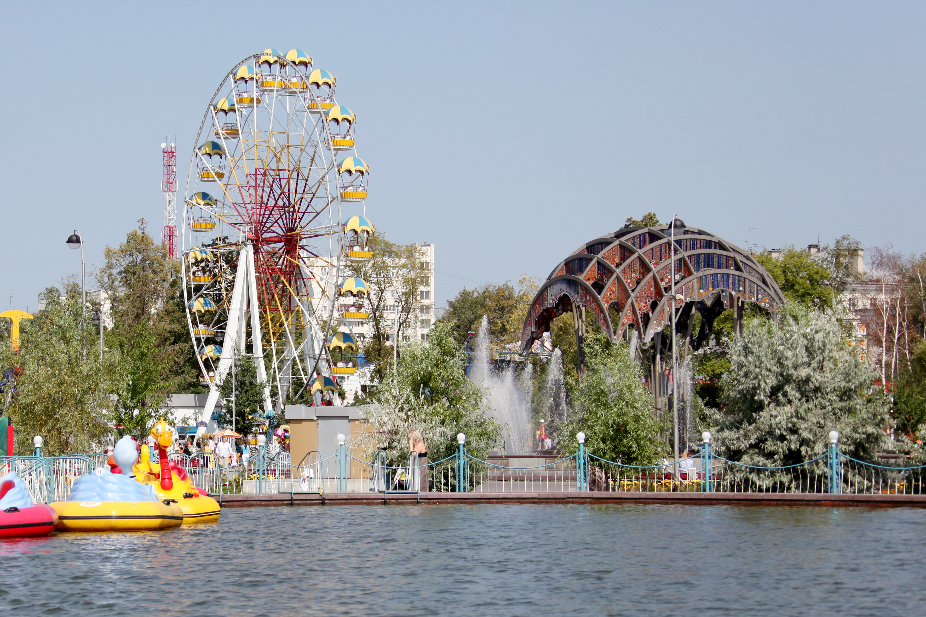 Kolora bulvardo. Tjumeno, Rusio.